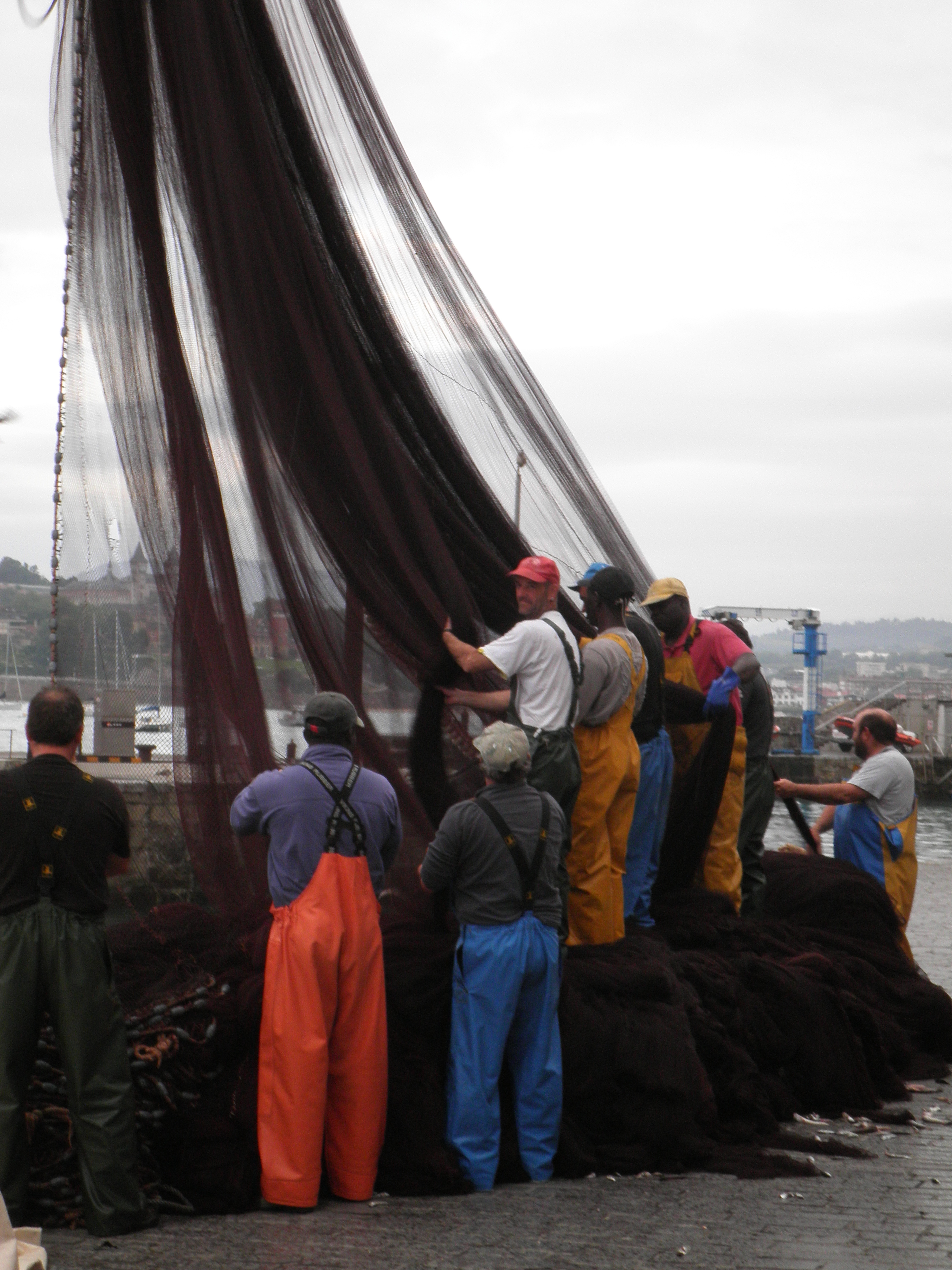 Arrantzaleak sarea jasotzen Donostiako kaian.